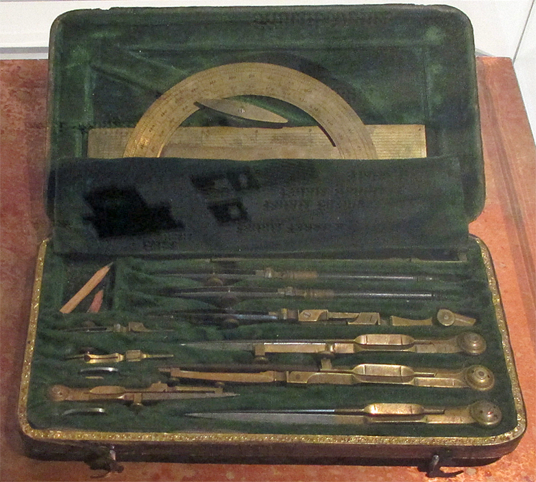 Persönliches Reisszeug von Karl König